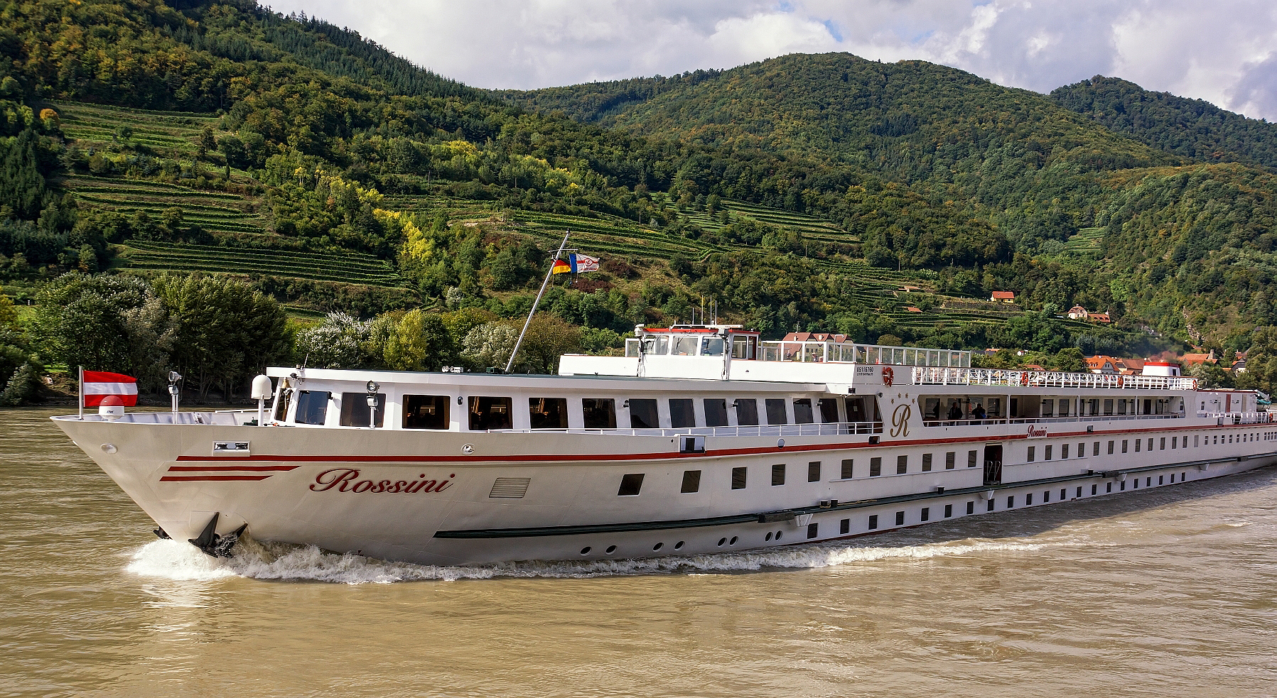 Kabinenfahrgastschiff Rossini auf der Donau